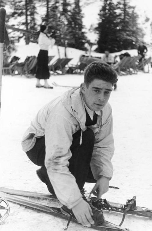 Rudolf Cranz, Abfahrt und Slalon Deutschland.